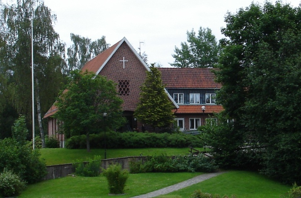 Sankt Andreas kyrka i Strömsnäsbruk i Markaryds kommun i Kronobergs län